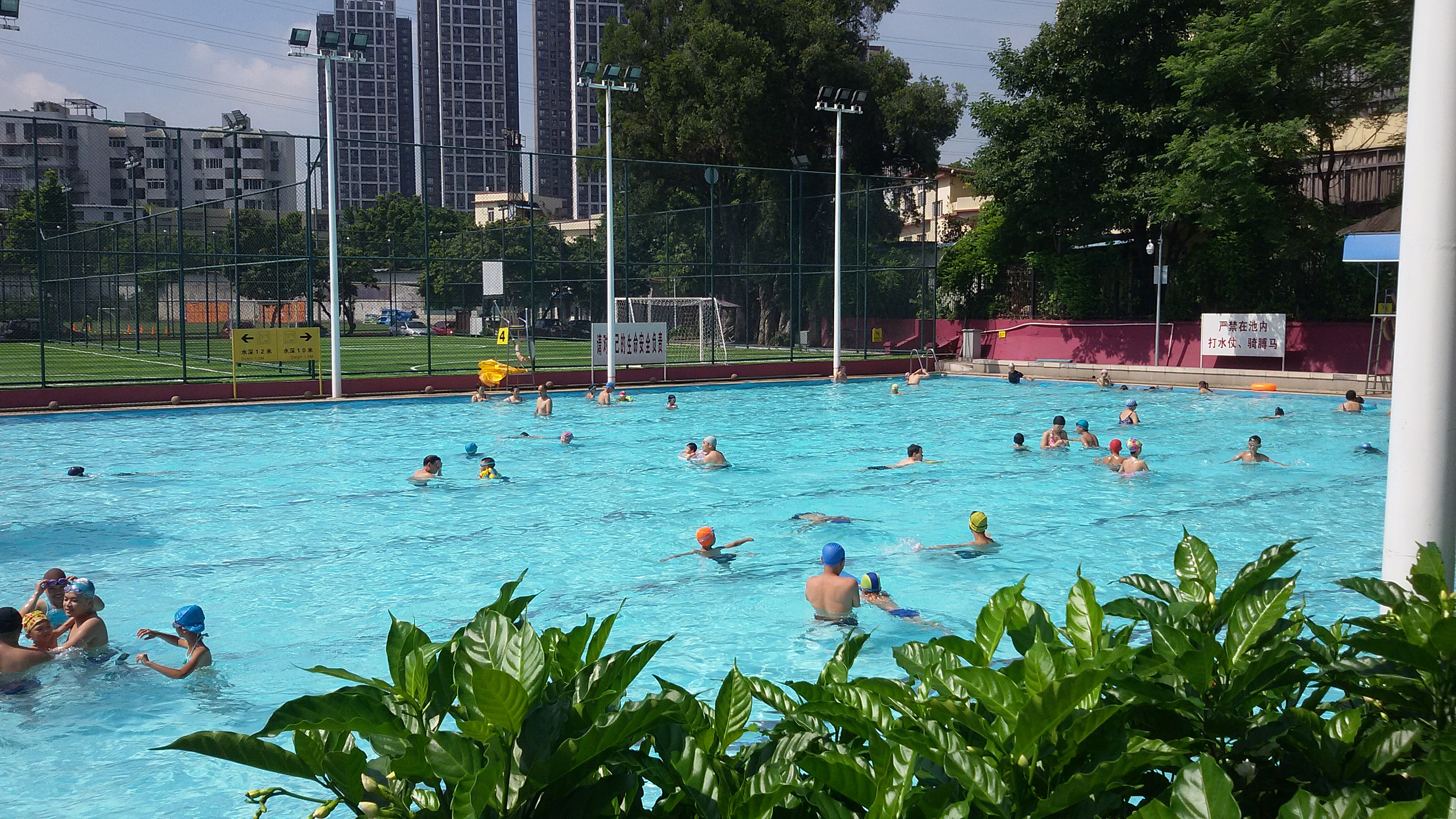 粵語: 海角紅樓嘅淺水池